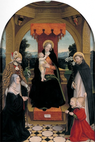 Pala buronzo, by Girolamo Giovenone.jpg